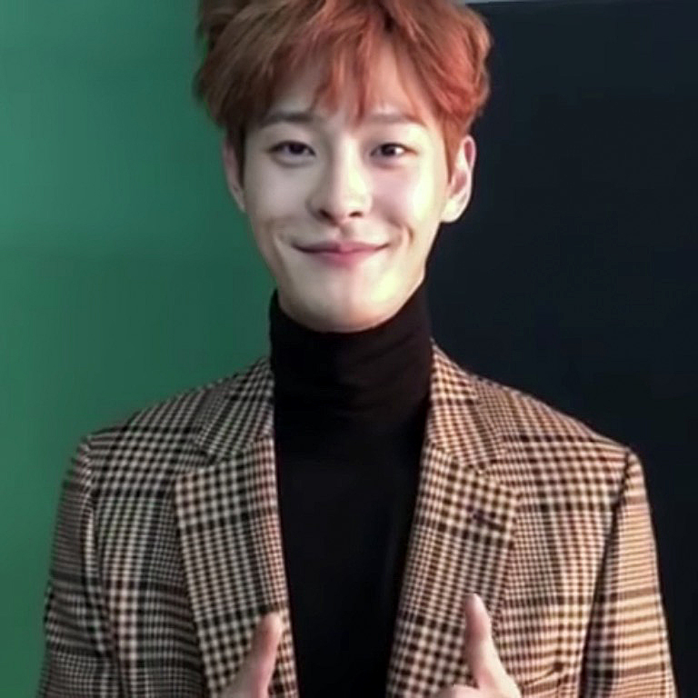 마리끌레르가 발견한 라이징 스타 차인하를 소개합니다. 11월 방영 예정인 드라마 '일단 뜨겁게 청소하라' 에서 그가 보여줄 연기, 기대해주세요! - Marie Claire shot up and coming actor Cha Inha.. 🔹 마리끌레르 구독하고👍🏻 매일매일 재미있는 영상을 받아보세요.😍 🔸 Web 🔸 Instagram 🔸 Facebook 🔸 Naver TV